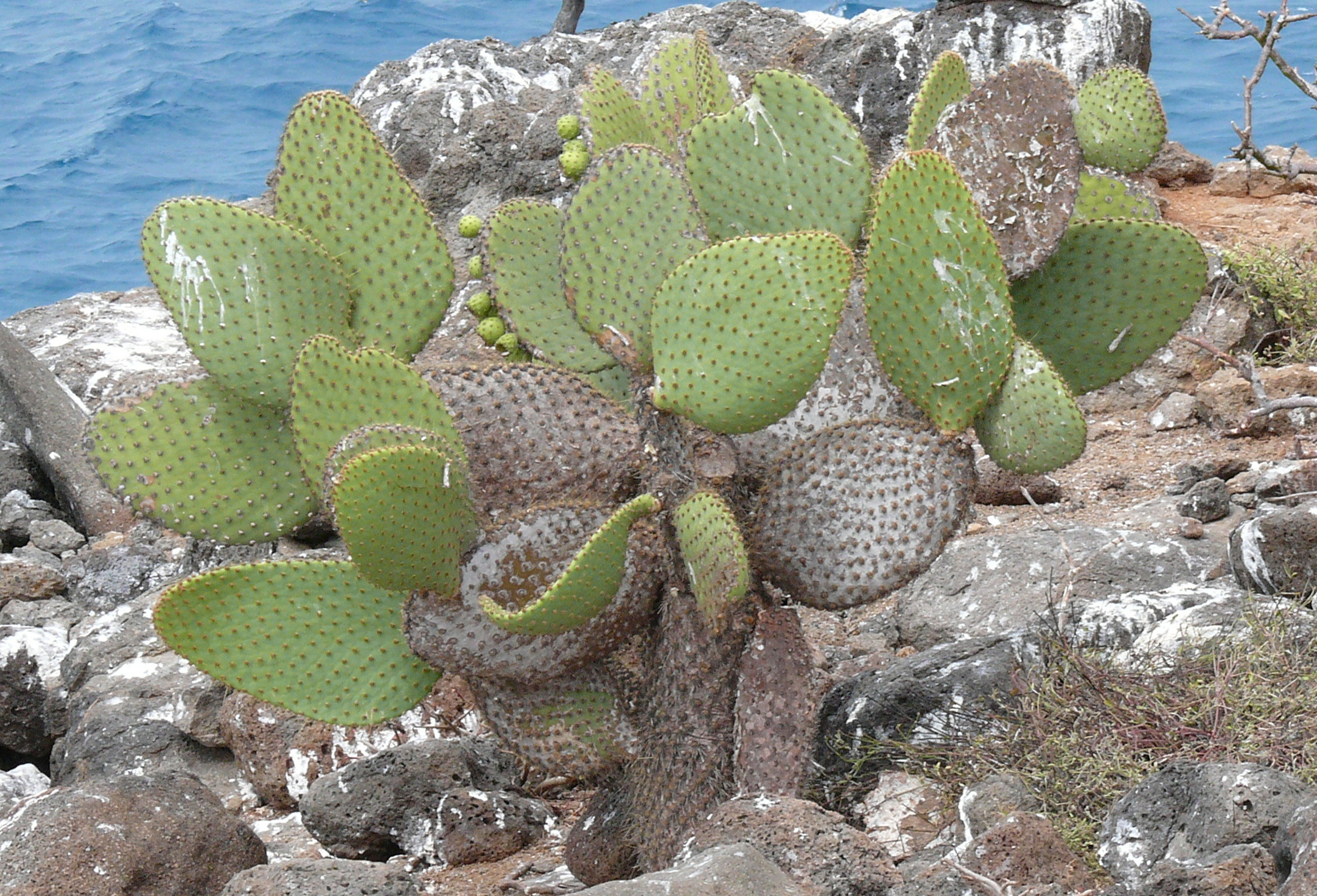 Baumopuntie (Opuntia echios var. zacana) auf Seymour norte (Galapagos)